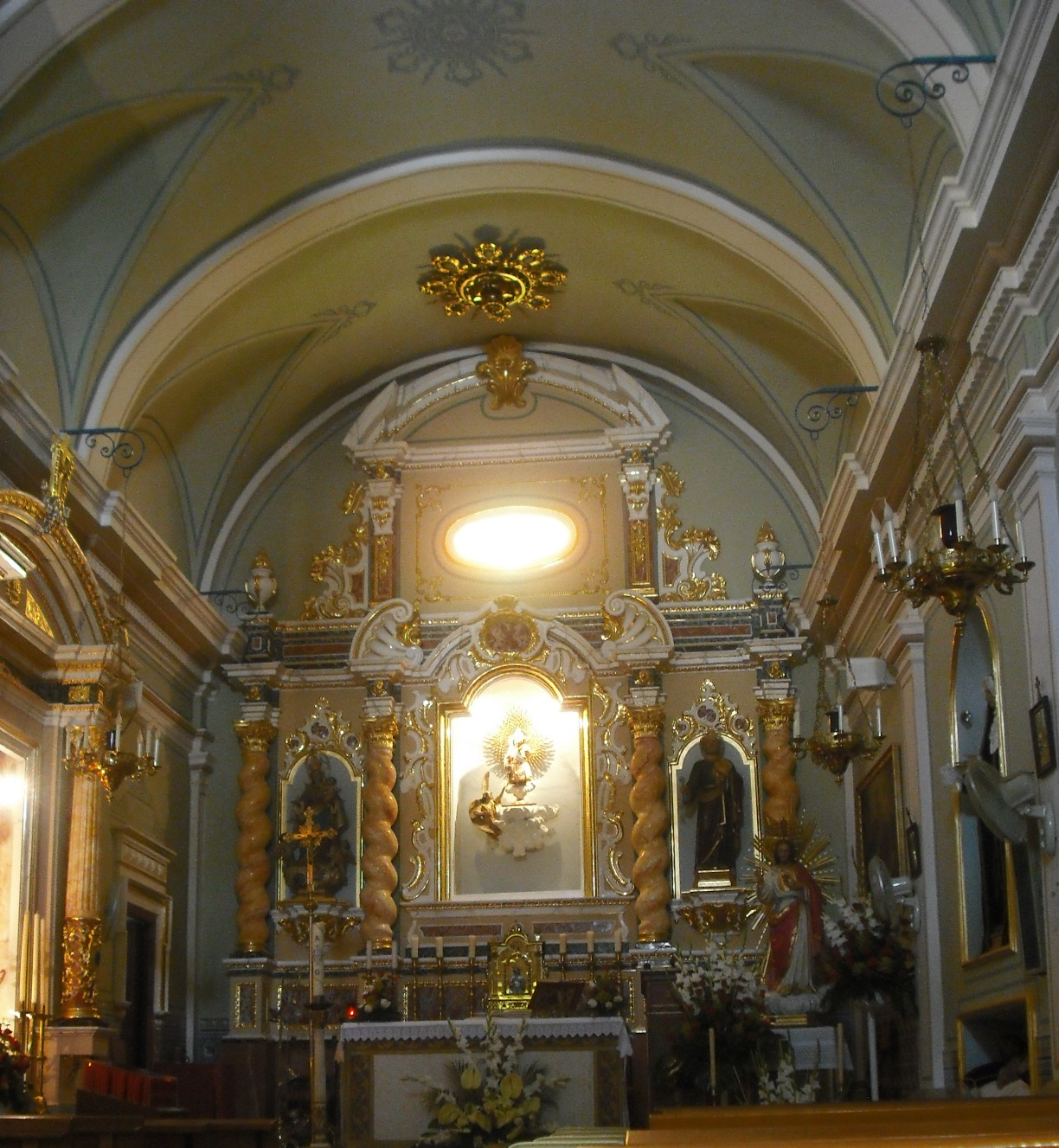 Interior de l'església de Jesús de l'Hort del Palmar.